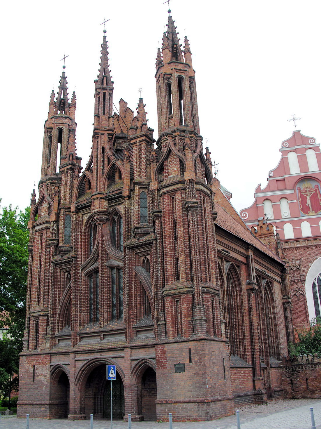 Šv. Onos bažnyčia. Saint Ann's church in Vilnius, Lithuania